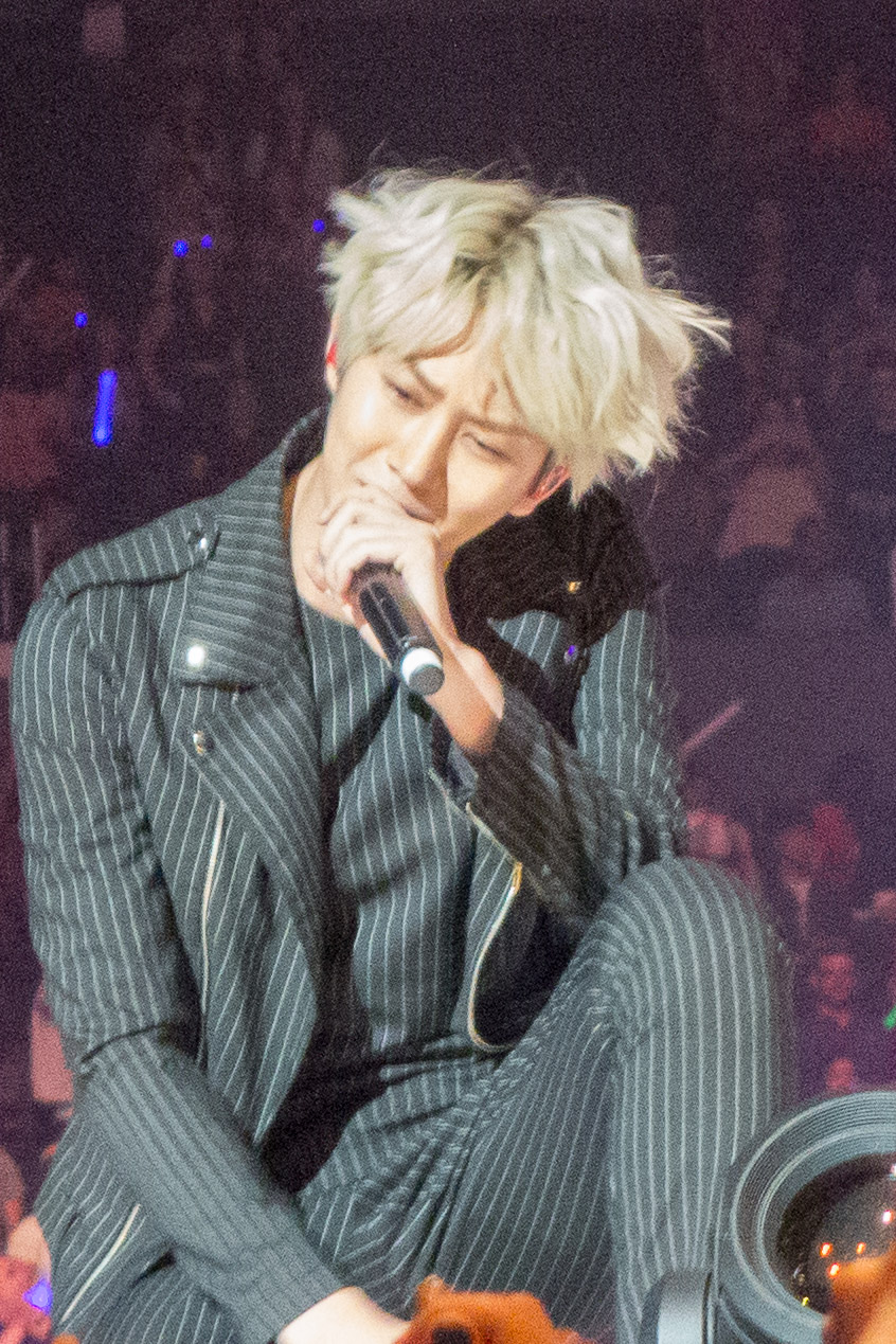 DSC03042-2